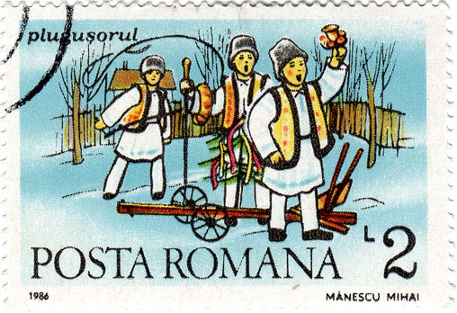 Source: Post of Romania